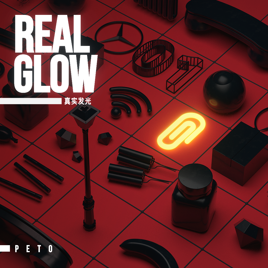 回形针PaperClip所发布的音乐专辑封面，《真实发光》。这张专辑收录了回形针PaperClip过去半年使用的 22 首原创音乐和2首最终未在视频中使用的音乐:《列车调度 Part2》和《三维模型 Part 2》。 相比上一张专辑《睿智时间》，《真实发光》开始尝试 trap 之外的多元风格，并加入更丰富的采样和人声，这也给了回形针的视效设计提供了大量的灵感。